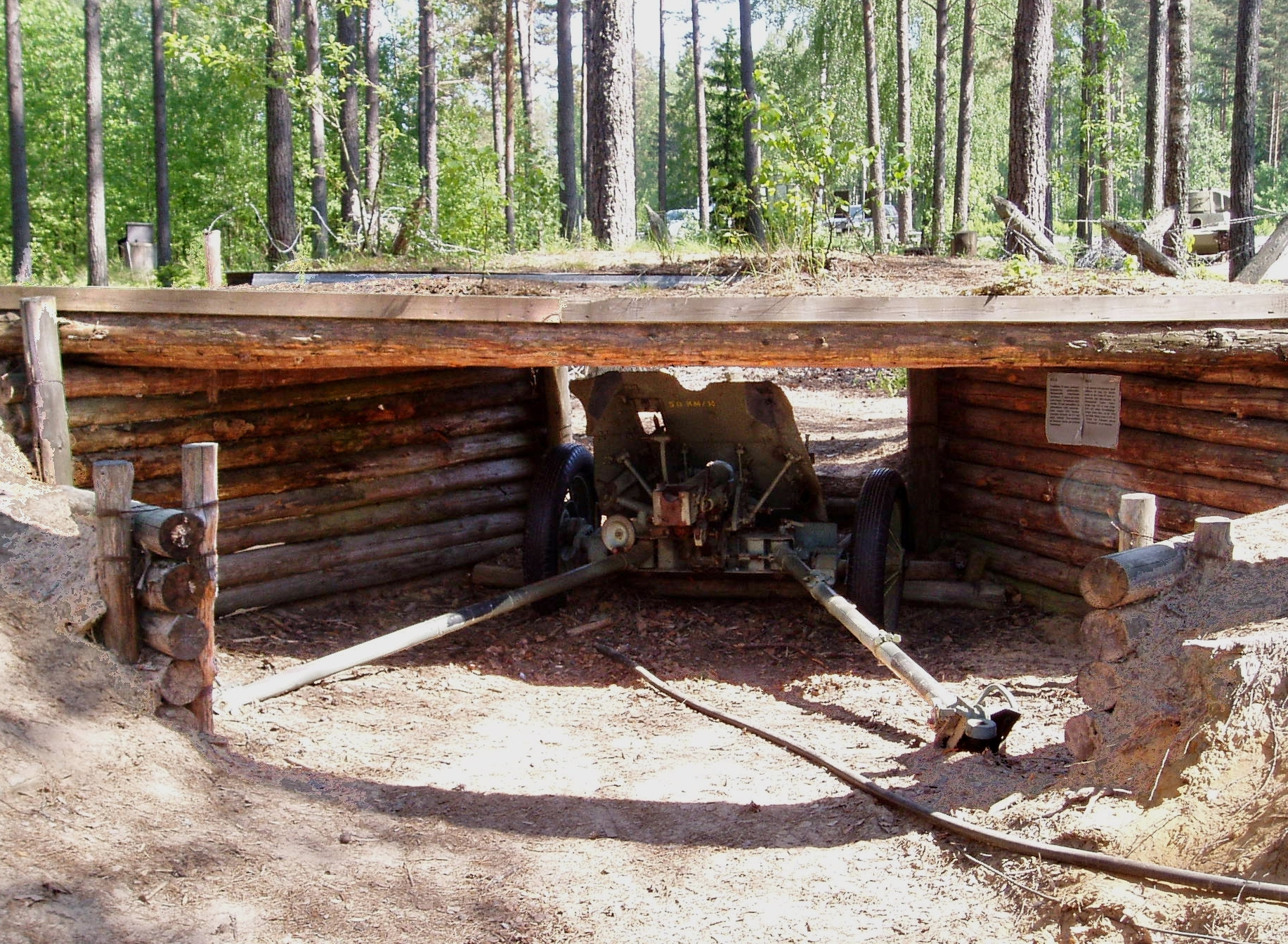 M-32 45 K. Photo by Ohto Kokko.